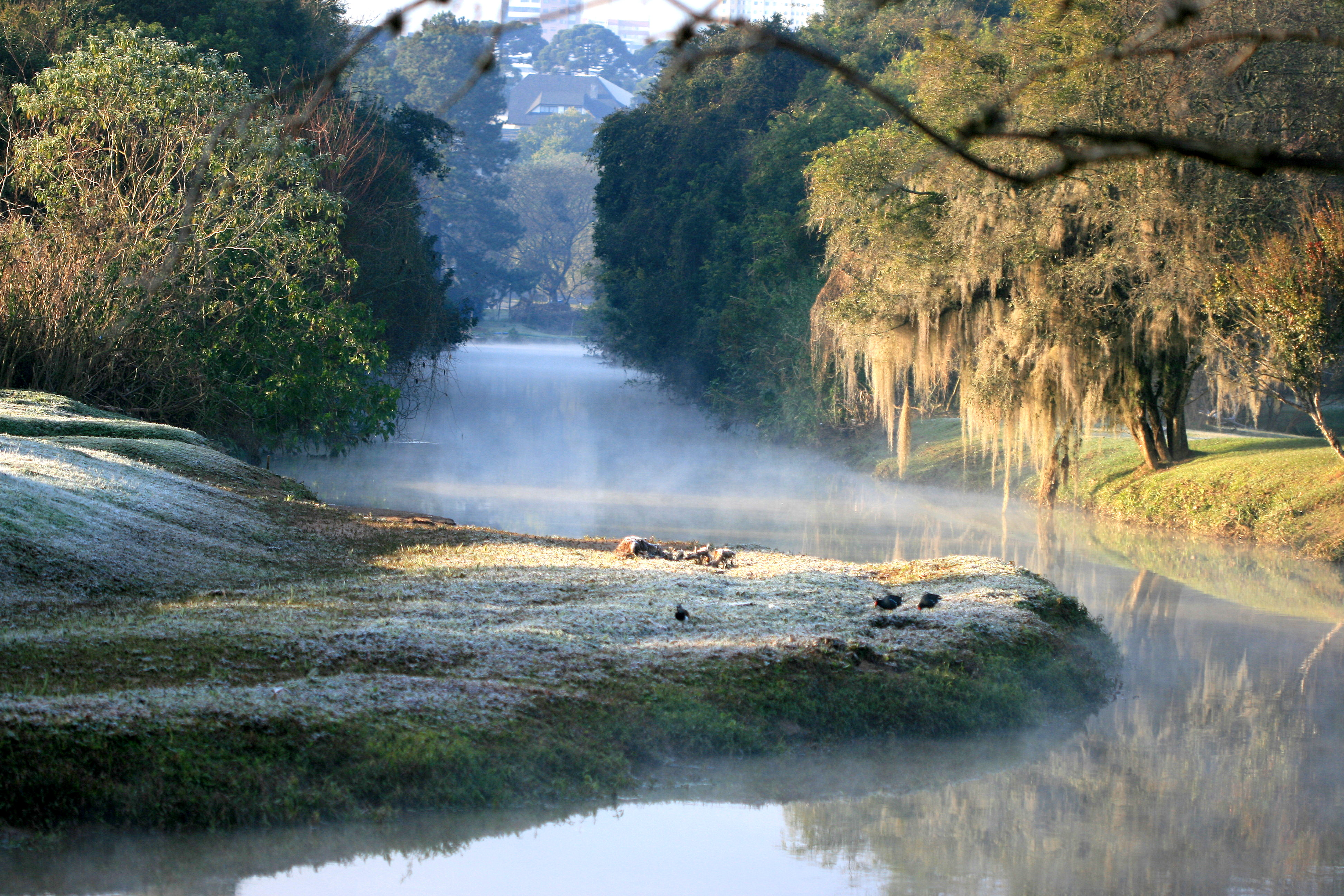 Parque curitibano